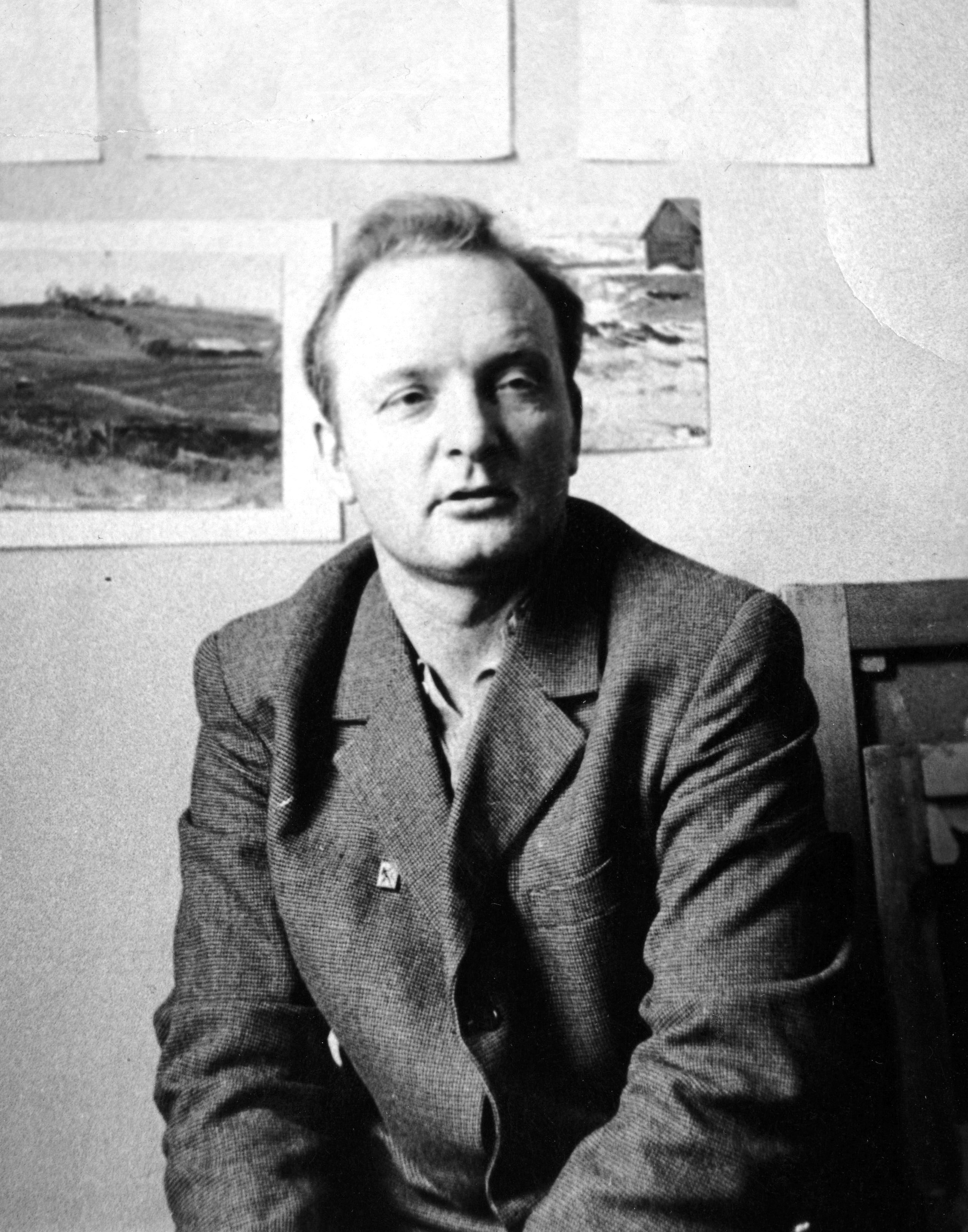 Борис Александрович Ефлов. Фотография в художественном фонде